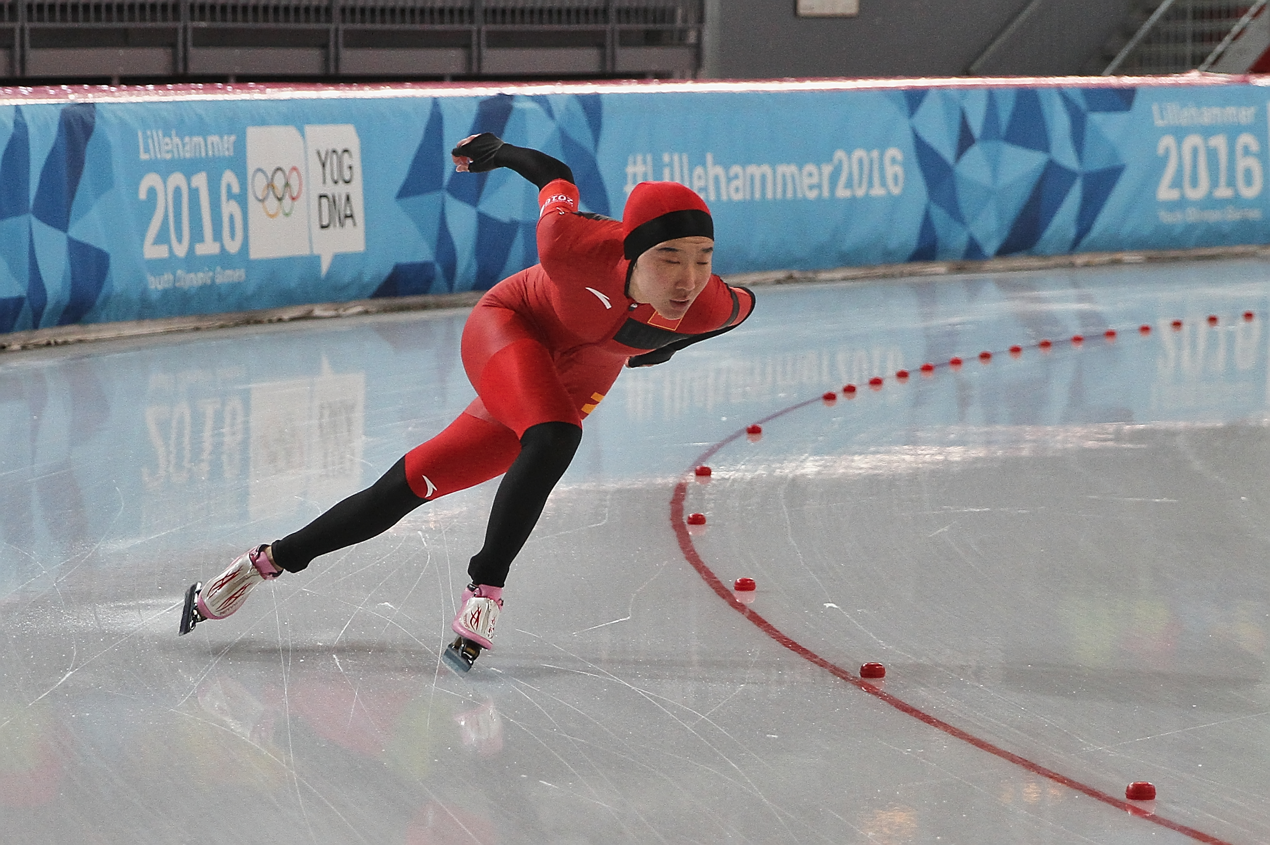 Lillehammer 2016 - Speed skating Ladies' 500m race 1 - Mei Han